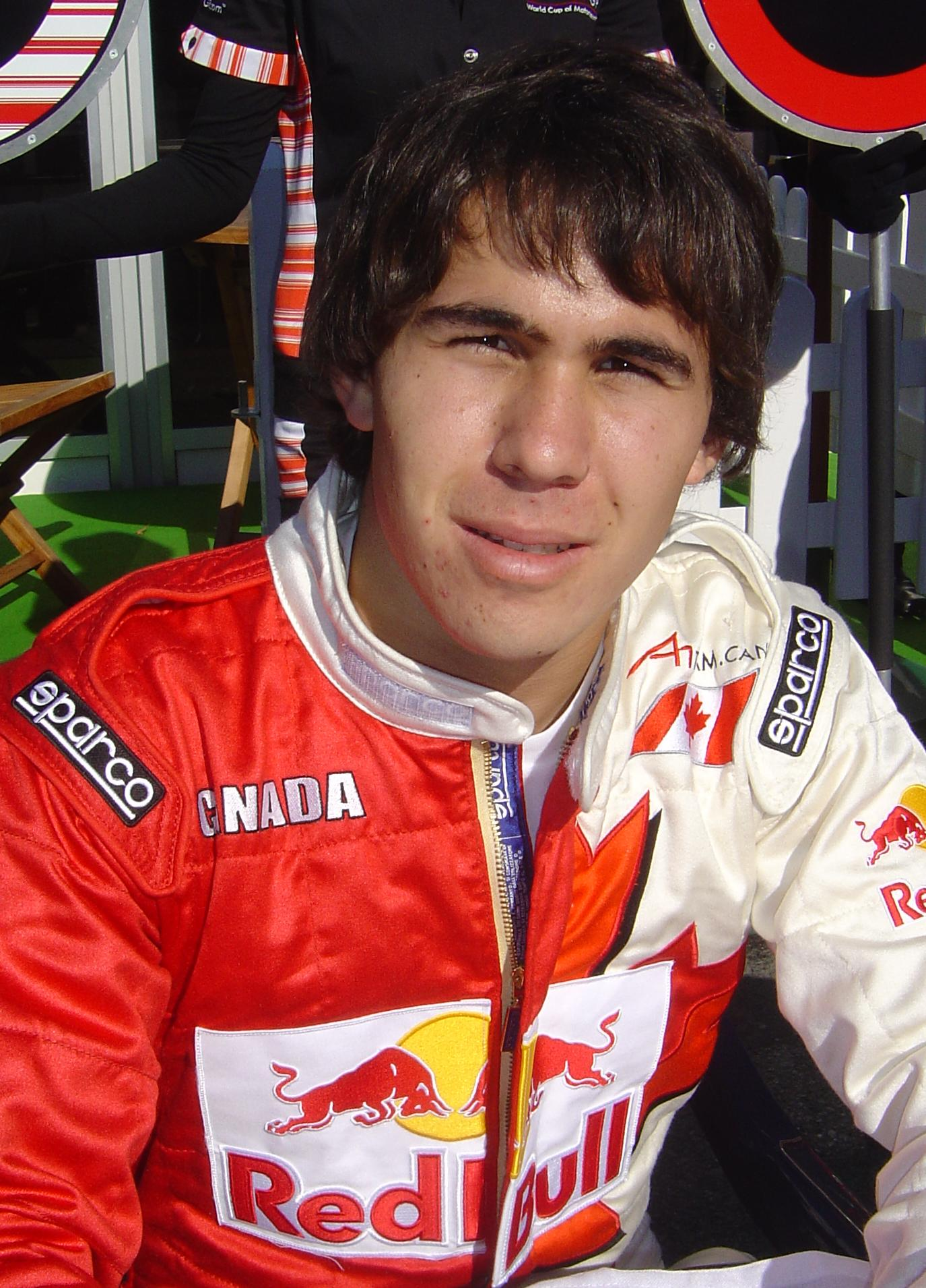 Robert Wickens, entstanden im Rahmen des A1GP-Rennwochenendes auf dem Automotodrom Brno